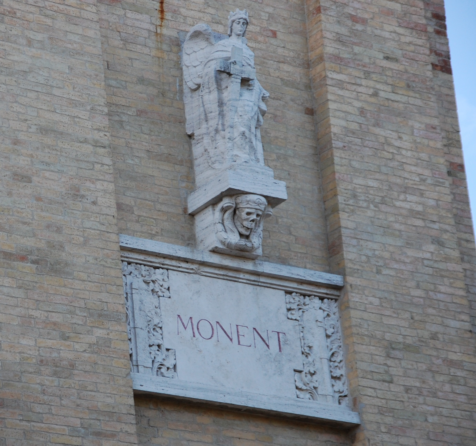 Monumento ai caduti della prima guerra mondiale di Montecarotto realizzato da Vito Pardo, dettaglio della mensola destra e e della statua raffigurante l'Italia Turrita. Si notano inoltre le fronde di quercia e d'alloro laterali sui lati della mensola e i resti dei fasci littori scalpellati.